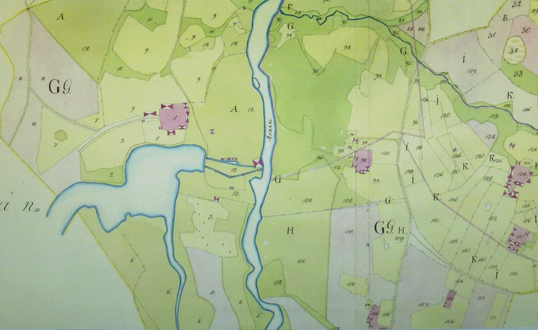 Nås socken Lindesnäs nr 1-15, Storskifte (del av)